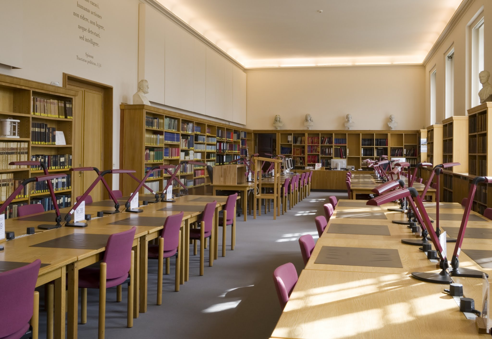 Blick in den Forschungssaal des GStA PK